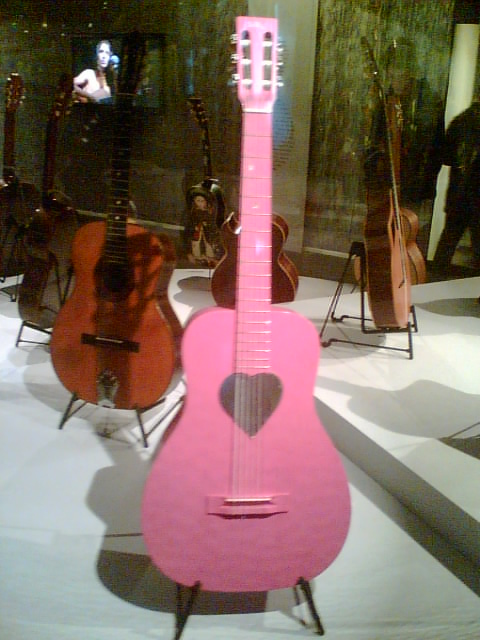 Guitare folk de Mathieu Chédid créée par le luthier Cyril Guérin.